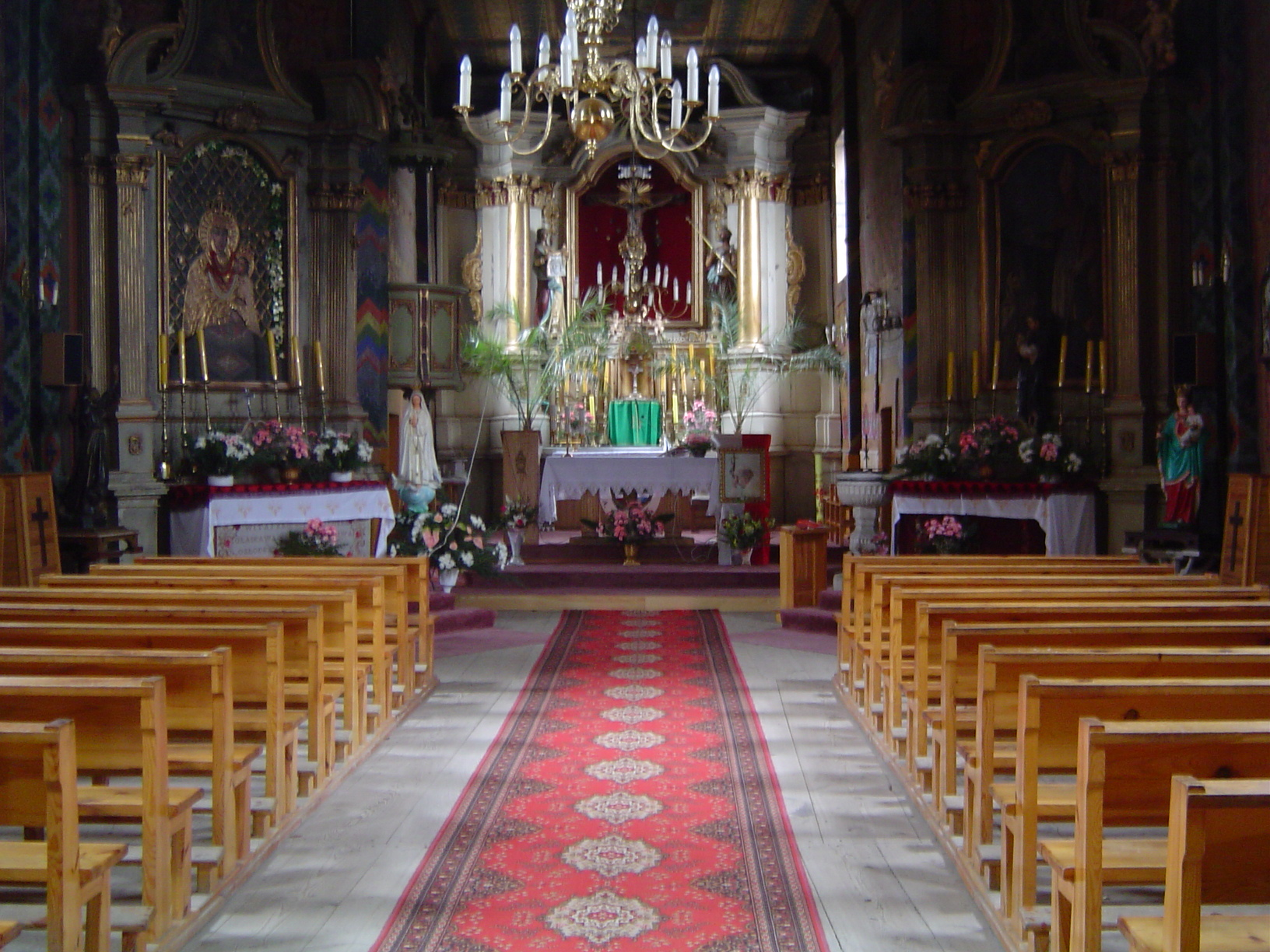 Świniary - Drewniany kościół pw. św. Stanisława Biskupa, wnętrze